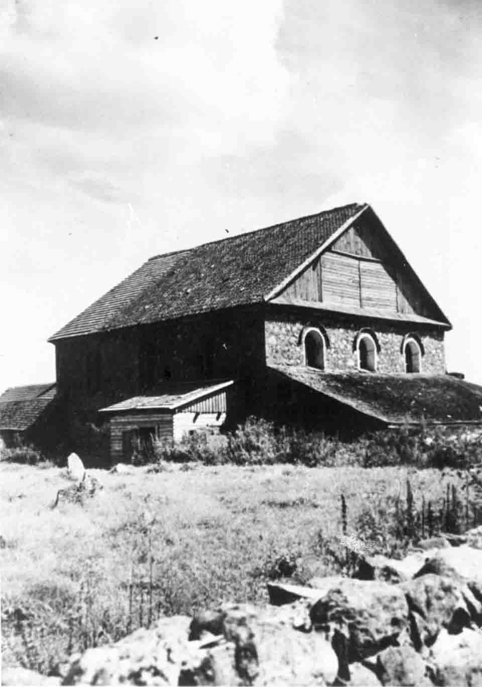 Беларуская (тарашкевіца): Зэльва (Zelva). Сынагога